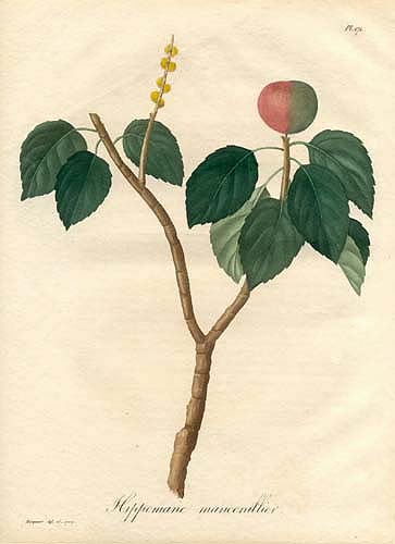 Hippomane mancinella illustration